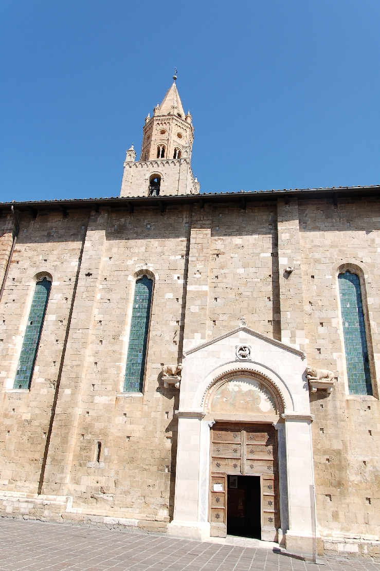 Atri 2011